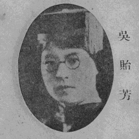 中文（台灣）: 《民國名人圖鑑》肖像